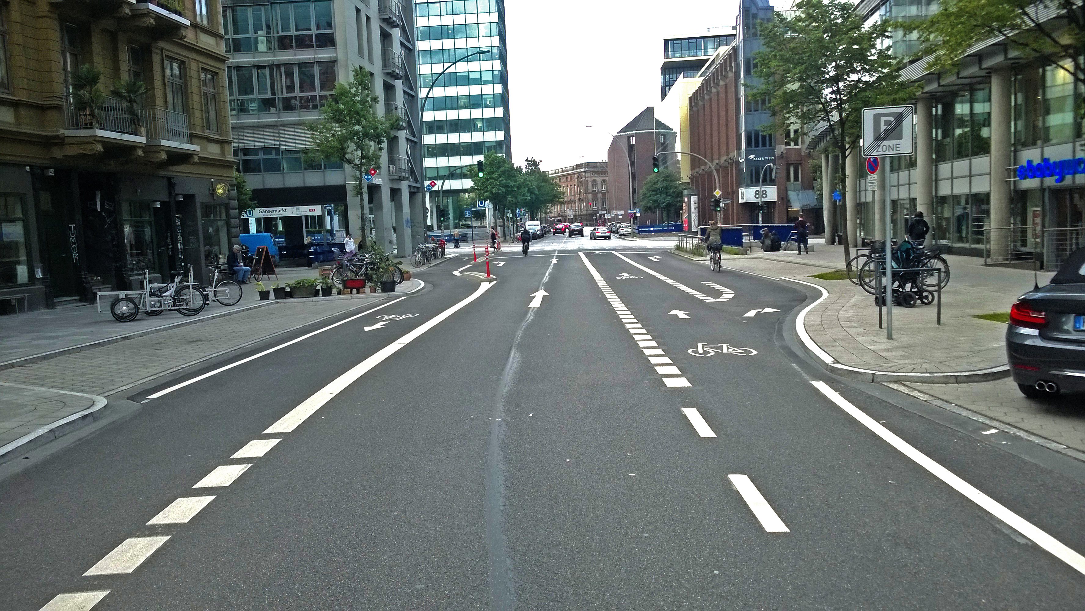 Radverkehrsanlage in der Caffamacherreihe in Hamburg